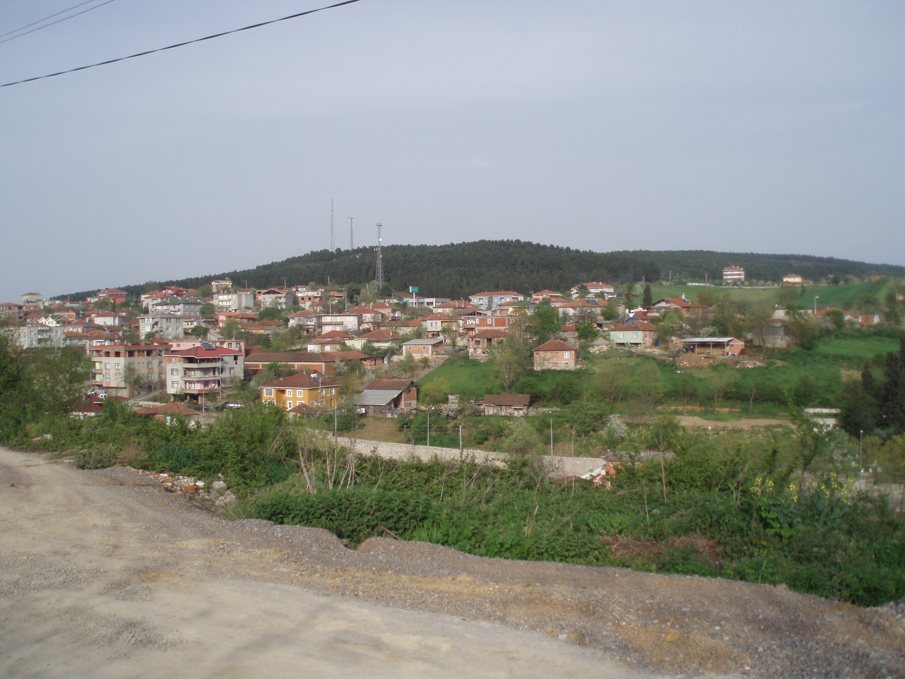 Ferizli, 54110 Ferizli/Sakarya, Turkey